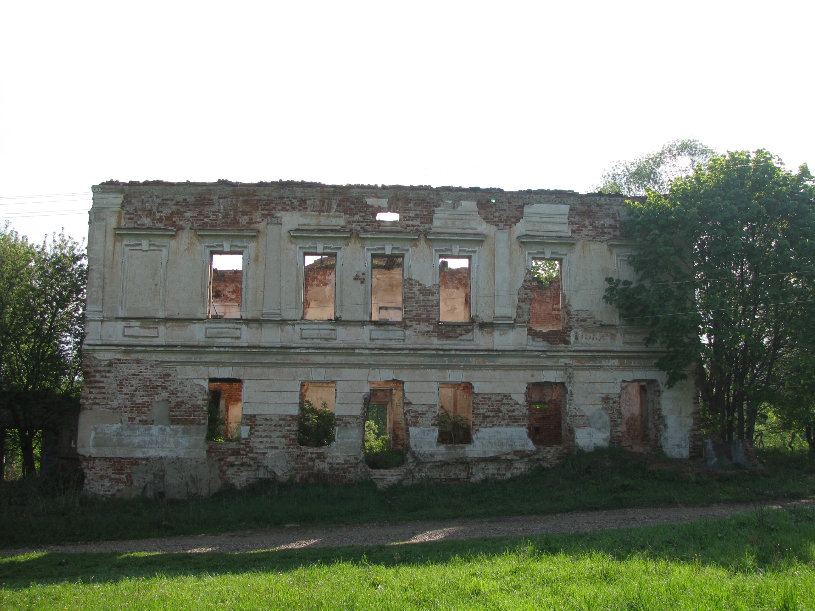 Podmoklovo village, Dolgorukovs' country estate (Serpukhov District, Moscow Region)/Деревня Подмоклово (Серпуховский район Московской области), усадьба Долгоруковых. Флигель.